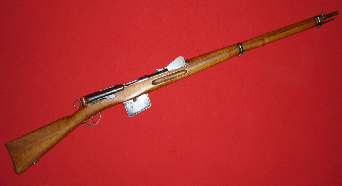 Szwajcarski karabin powtarzalny Karabin Schmidt-Rubin M1889.